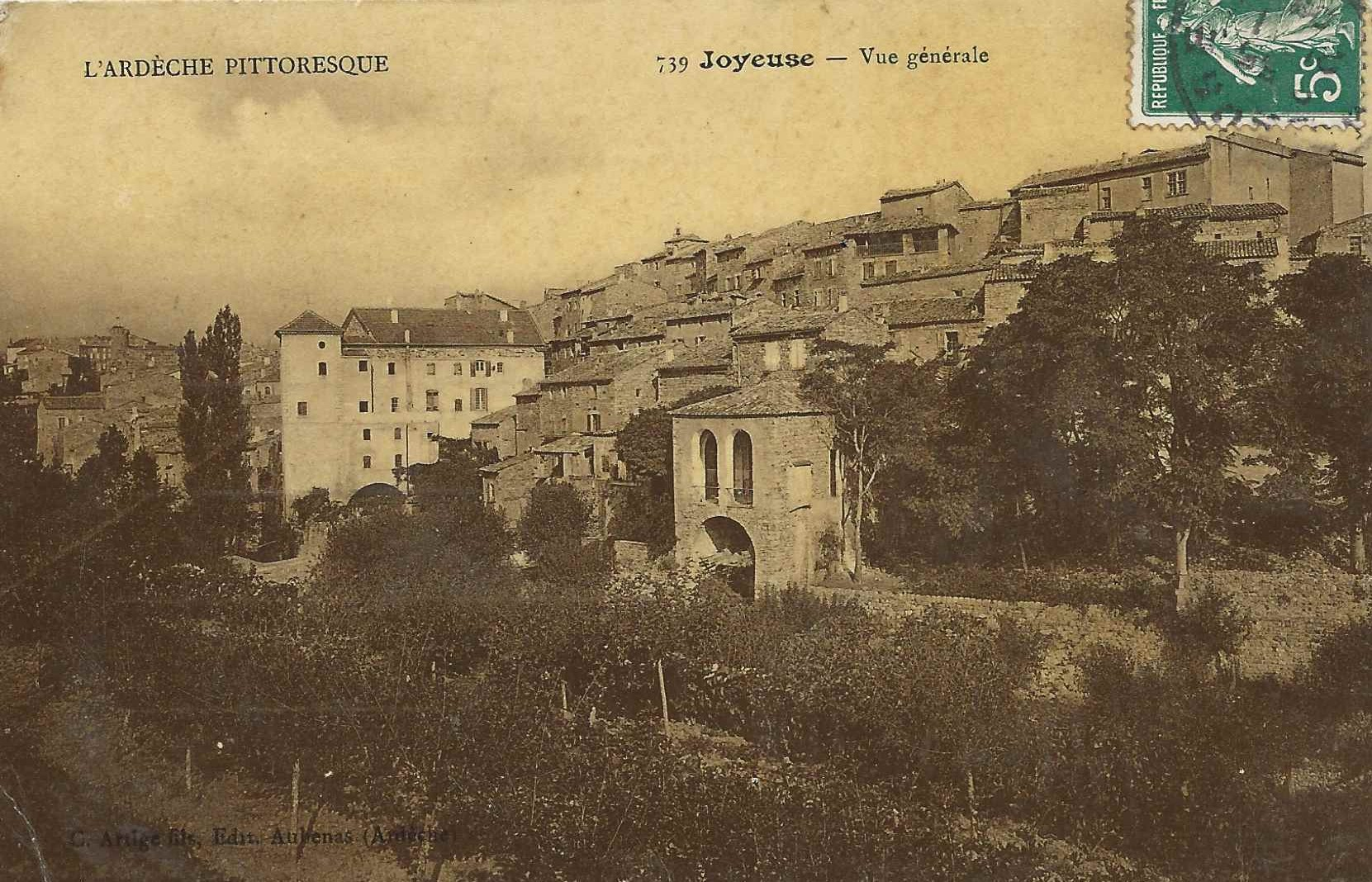 L'hôtel de la Saumès (grosse maison blanche avec une tour carrée, vestige des remparts), aujourd'hui détruit était reconverti en hôpital au XIX ème siècle.